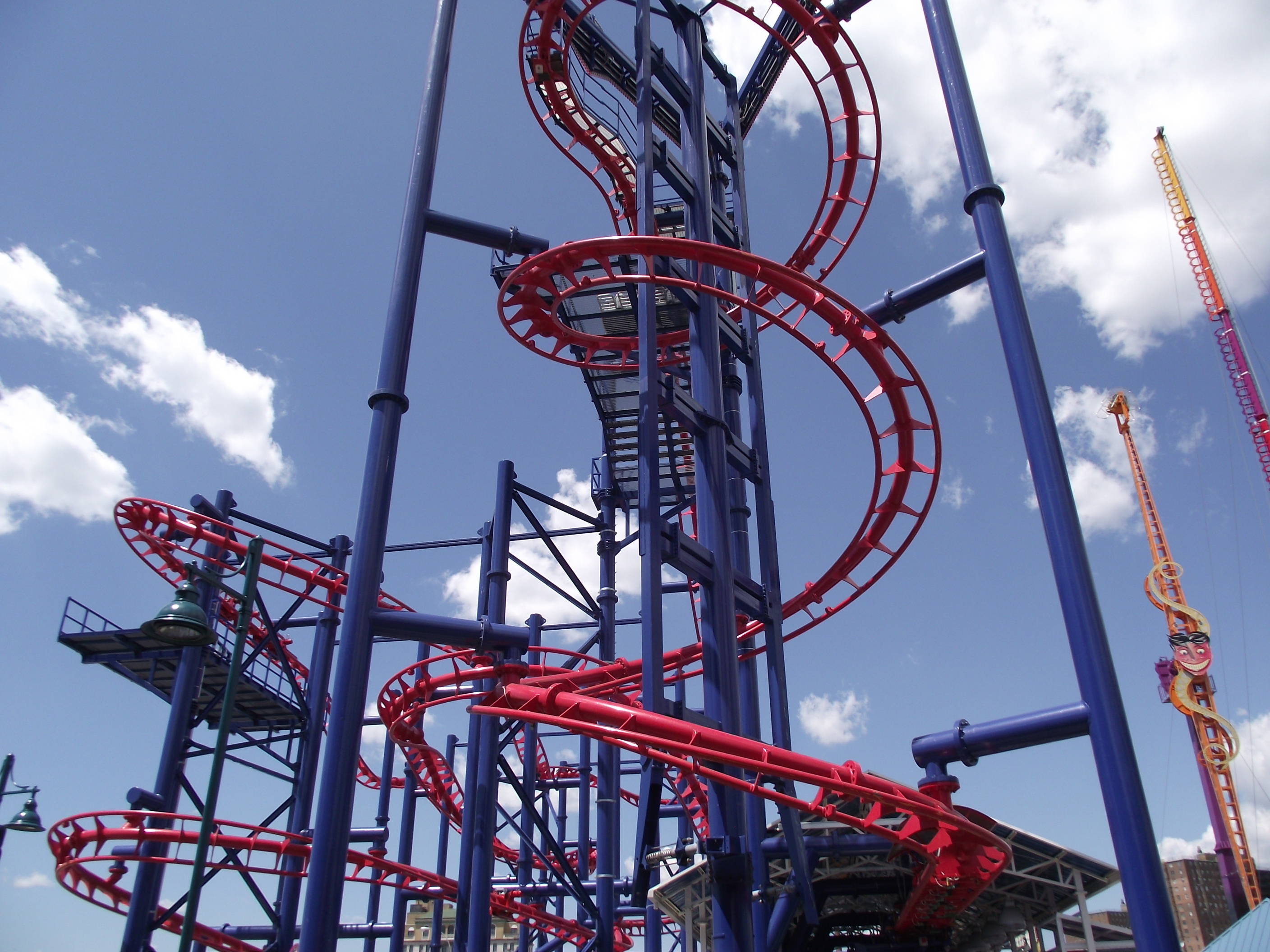 Soaring Eagle Scream Zone Luna Park Coney Island